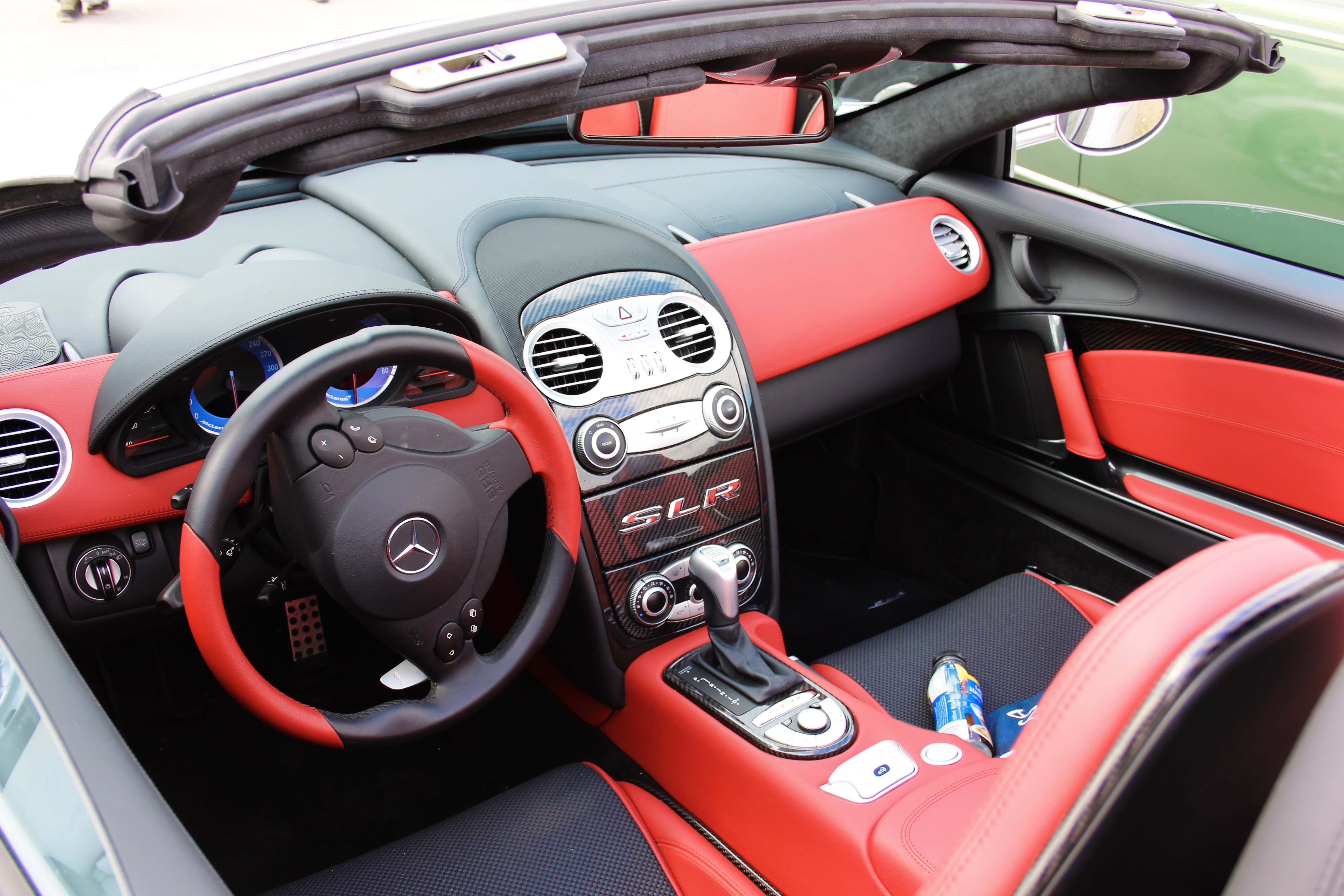 Mercedes-Benz SLR McLaren - Innenraum